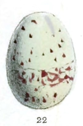 PLANCHE XXIX Ovologie Toutes les figures sont de grandeur naturelle. Figure 22. — Pitta angolensis, Vieill. Pl. XXIX. J Terrier del. Oologie. (Types nouveaux ou rares) Imp Becquet fr. Paris Title: Faune de la Sénégambie, vertébrés Year: 1883 (1880s) Authors: Rochebrune, Alphonse Trémeau de, 1834- Subjects: Zoology Vertebrates Mammals Reptiles Amphibians Fishes Publisher: Paris : Octave Douin Text Appearing Before Image: PLANCHE XXIX Ovologie Toutes les figures sont de grandeur naturelle. Figure 1. — Cuculus solitarius, Steph. » 2. — Ceutmochares flavivostris, Rochbr. » 3. — Pogonohynchus bidentatus, Heugl. » 4. — Colius macrourus, Heugl. » 5. — Merops nubicus, Gm. » 6. — Caprimulgus rufigena, A. Smith, » 7. — Macrodipterix longipennis, Shaw. » 8. — Sylvietta rufescens, Cass. » 9. — Prinia mystacea, Rüpp. » 10. — Cisticola rufa, Sharpe. » 11. — Cisticola strangei, Sharpe. » 12. — Laniarius cruentus, Hartl. » 13. — Lamprotornis œnea, Hartl. » 14. — Cryptorhina afra, Sharpe. » 15. — Corvus scapulatus, Daud. » 16. — Hyphantornis ocularius, Hartl. » 17. — Hyphantornis aurifrons, Hartl. » 18. — Penthetria ardens, Cab. » 19. — Estrilda cœrulescens, Swain. » 20. — Galerita senegalensis, C. Bp. » 21. — Certhilauda nivosa, Swain. » 22. — Pitta angolensis, Vieill. Pl. XXIX. Text Appearing After Image: J Terrier del. Oologie. (Types nouveaux ou rares) Imp Becquet fr. Paris PLANCHE XXX Ovologie Toutes les figures sont de grandeur naturelle. Figure 1. — Pterocles exustus, Temm. » 2. — Houbara undulata, Gray. » 3. — Cursorius senegalensis, Hart. » 4. — Anthropoides virgo, Vieill. 5. — Garzetta garzetta, Gray. » 6. — Parra africana, Gm. » 7. — Porphyrio smaragnotus, Temm. » 8. — Nettapus auritus, Gray. » 9. — Graculus africanus, Gray.